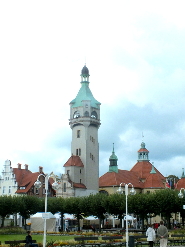 Latarnia morska w Sopocie